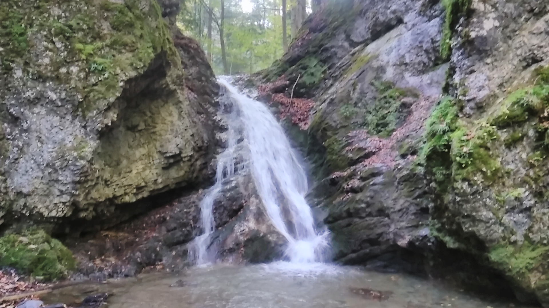 Királyka